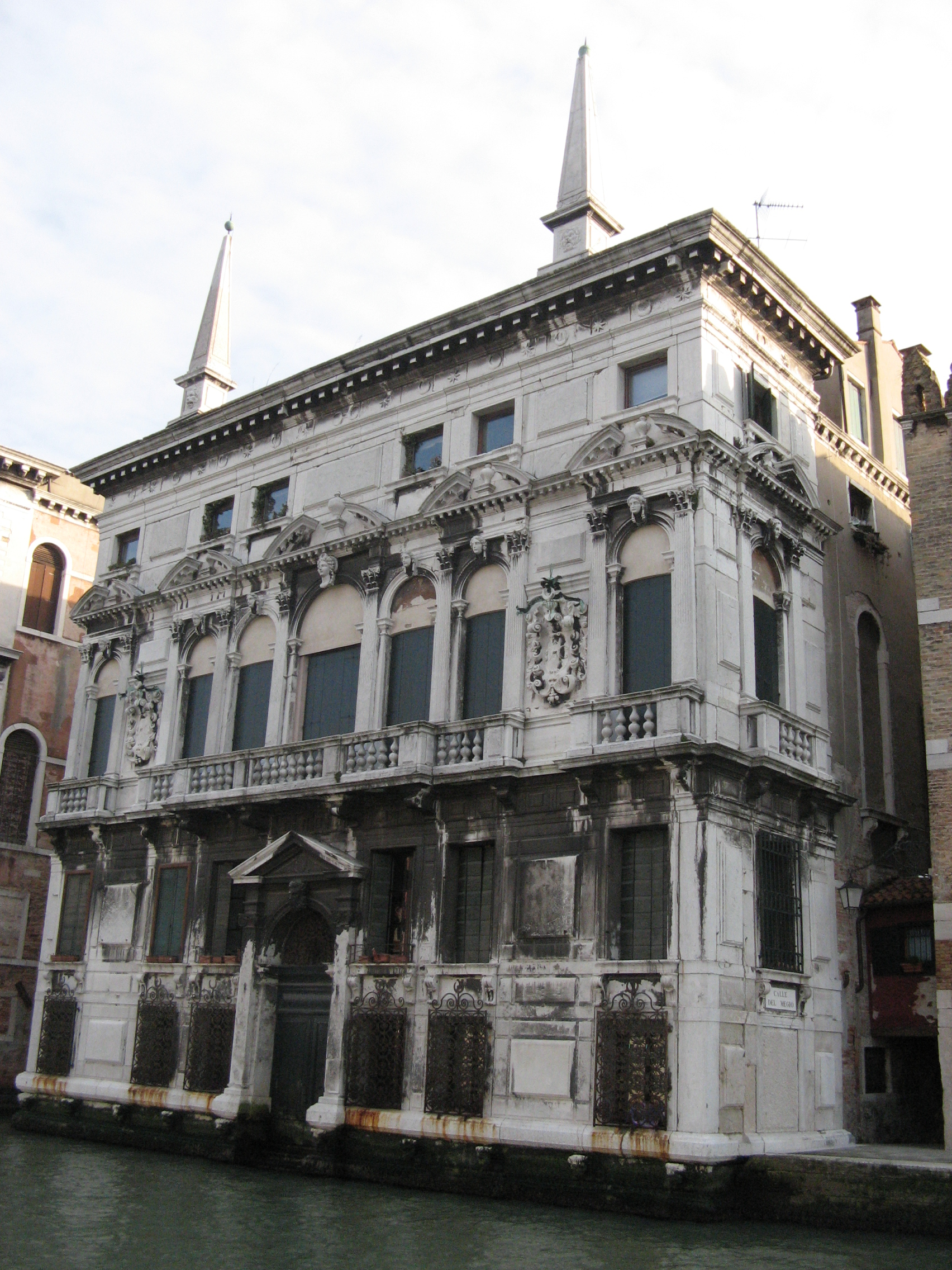 Venezia - Palazzo Belloni Battagia